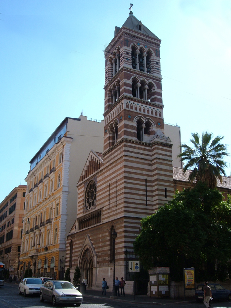 Chiesa di San Paolo dentro le Mura (St Paul's within the Walls), nel rione Castro Pretorio, a Roma. Foto personale.